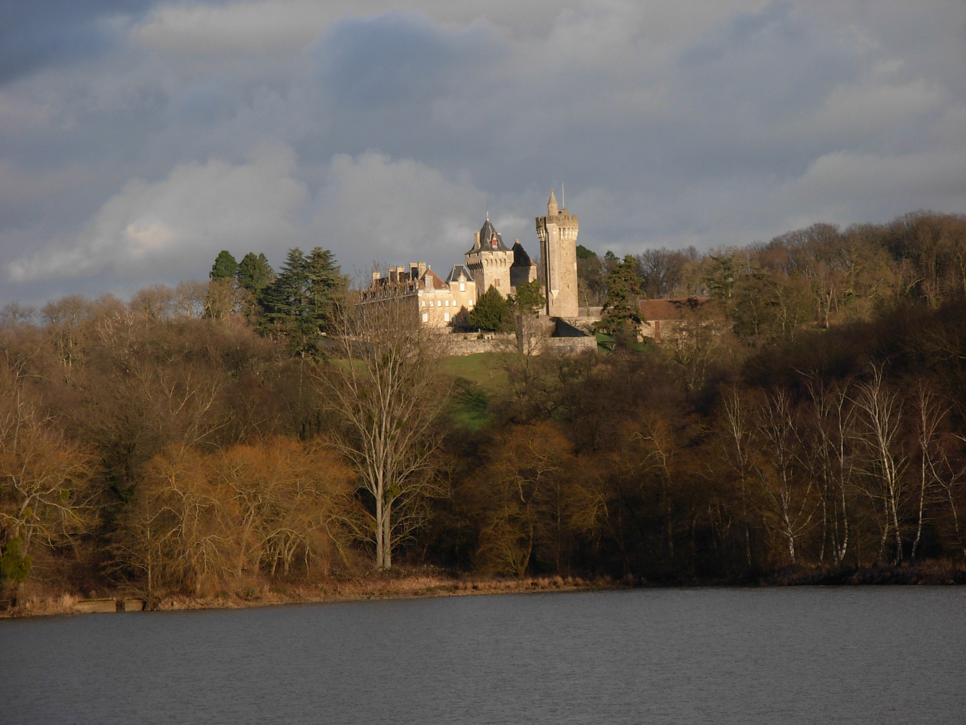 château du Plessis (Blanzy) France